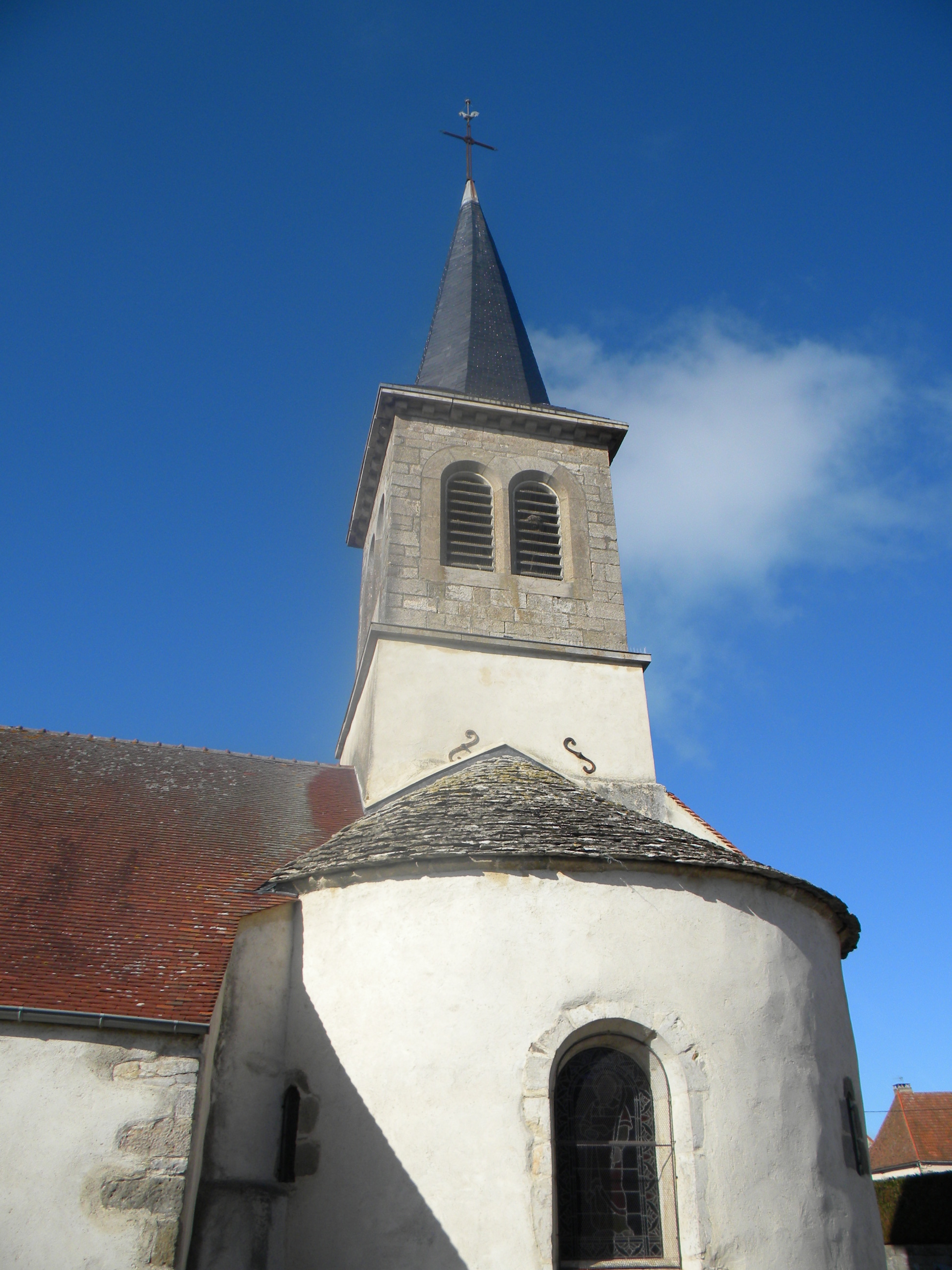 Preĝejo de Ivry-en-Montagne